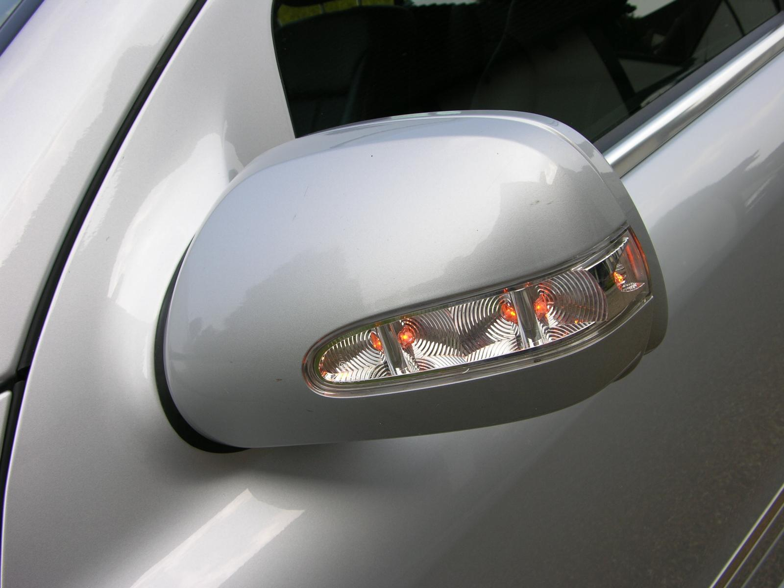 Mercedes Benz GL420 CDi 4-Matic